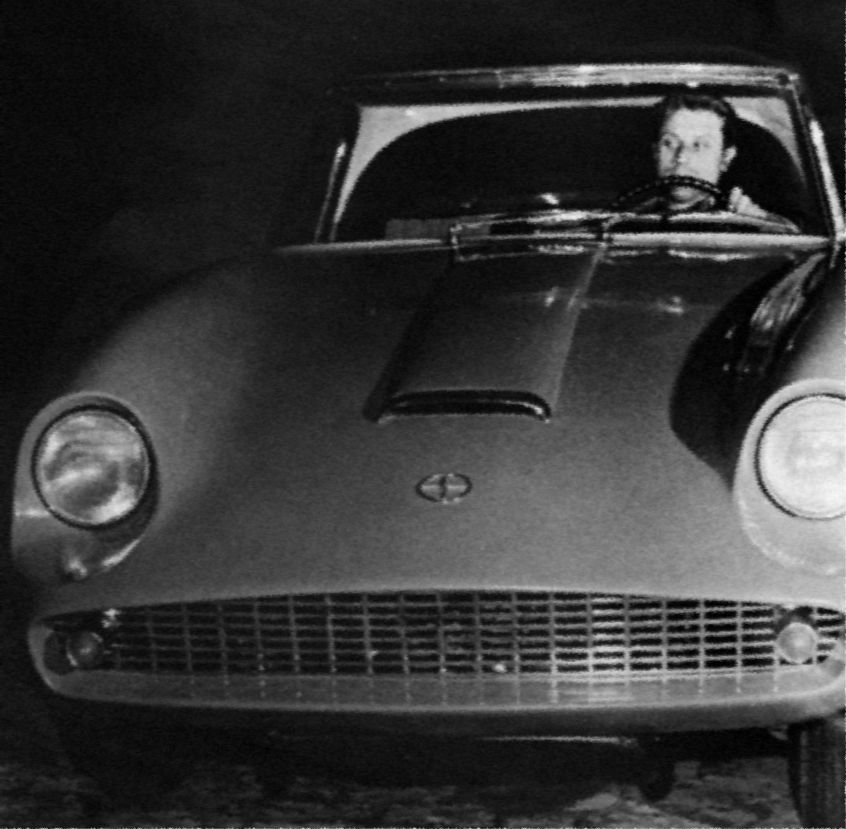 Cezary Nawrot, designer, za kierownicą zaprojektowanej przez siebie Syreny Sport